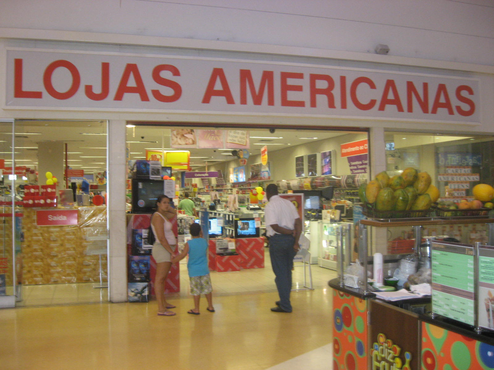 Vista de uma filial das Lojas Americanas, no Shopping Grande Rio, em São João de Meriti, RJ.